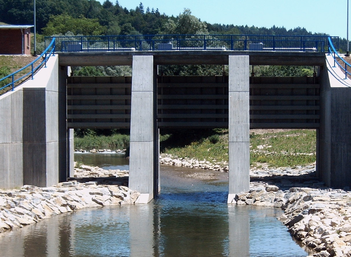 Sperrbauwerk des Hochwasserrückhalteraumes Reichenhof der Rems, Blick von flussabwärts